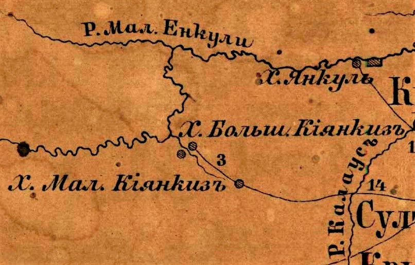 Хутора Большой Кианкиз и Малый Кианкиз на 10-вёрстной карте Ставропольской епархии 1889 года